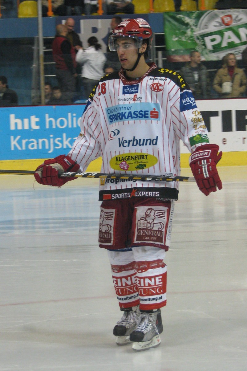 Martin Schumnig 301009.jpg